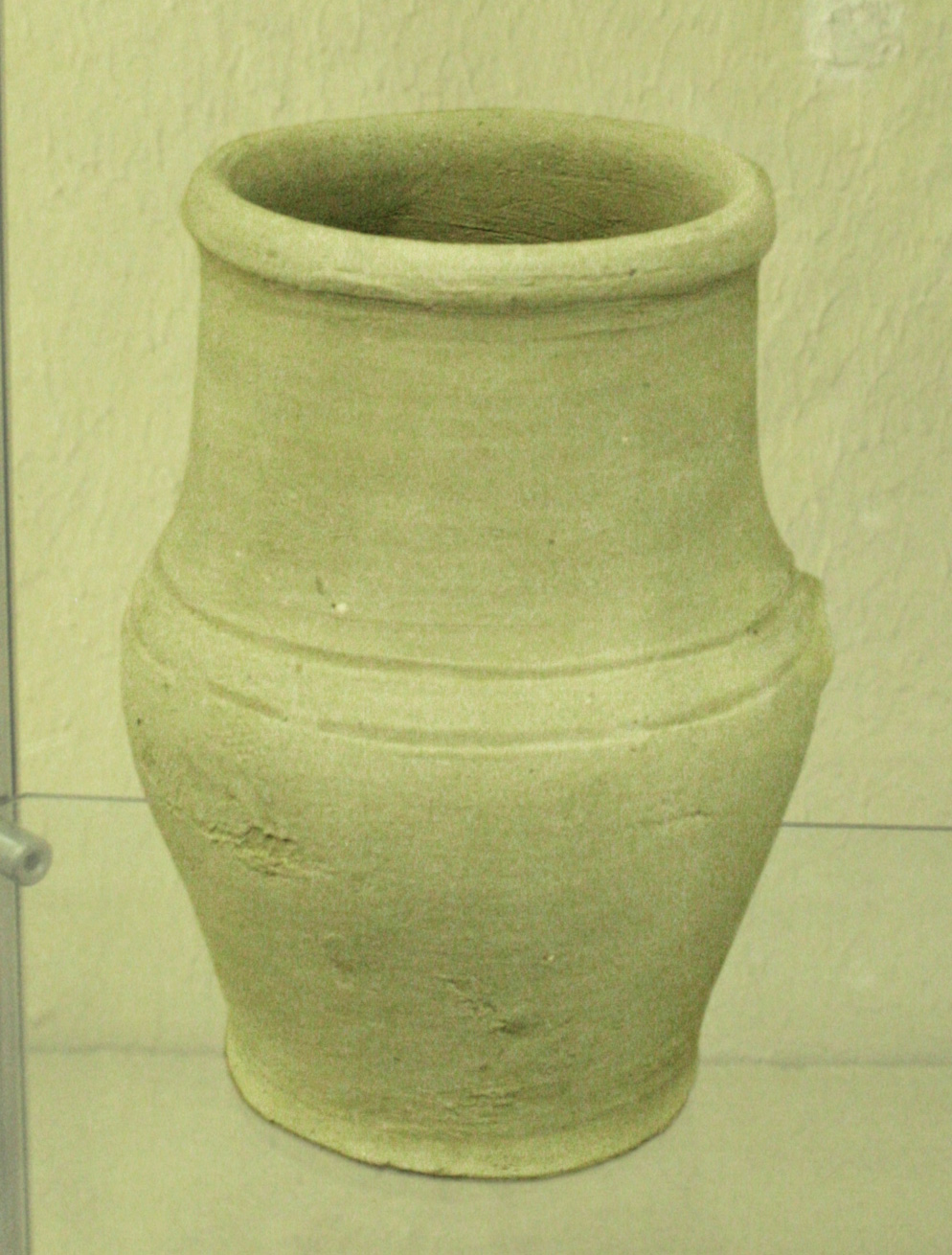 Горшок (муляж), Крапивенского городища. Древнерусская культура, X–XIII века. Из фондов Шебекинского историко-художественном музея.